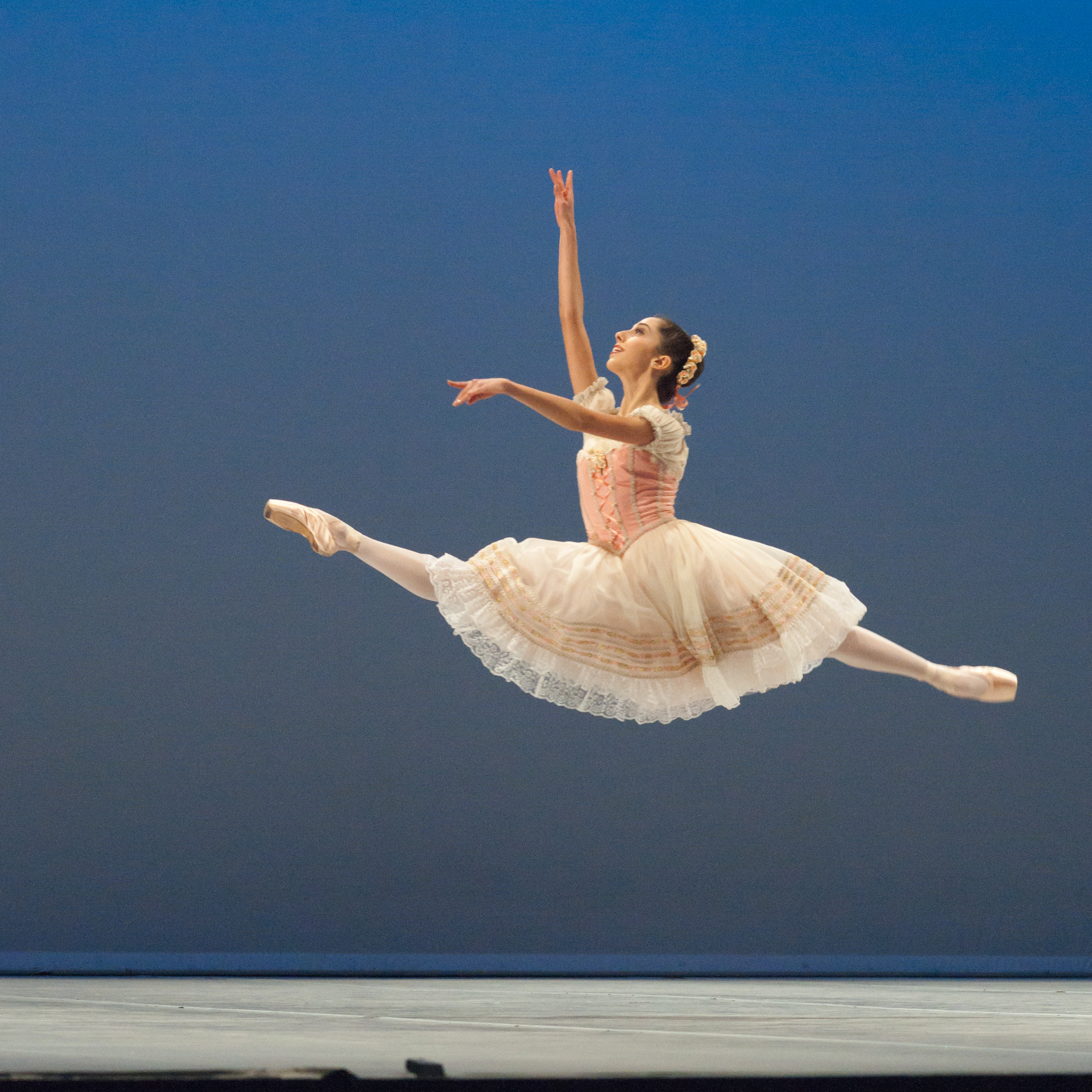 Variation extraite de Coppélia au Prix de Lausanne 2010.